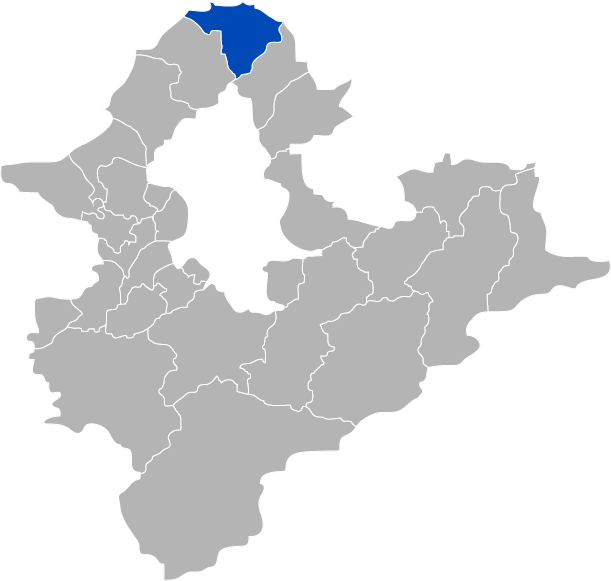 KaurJmeb為編寫中華民國臺灣省臺北縣石門鄉，於2005年2月6日所繪。